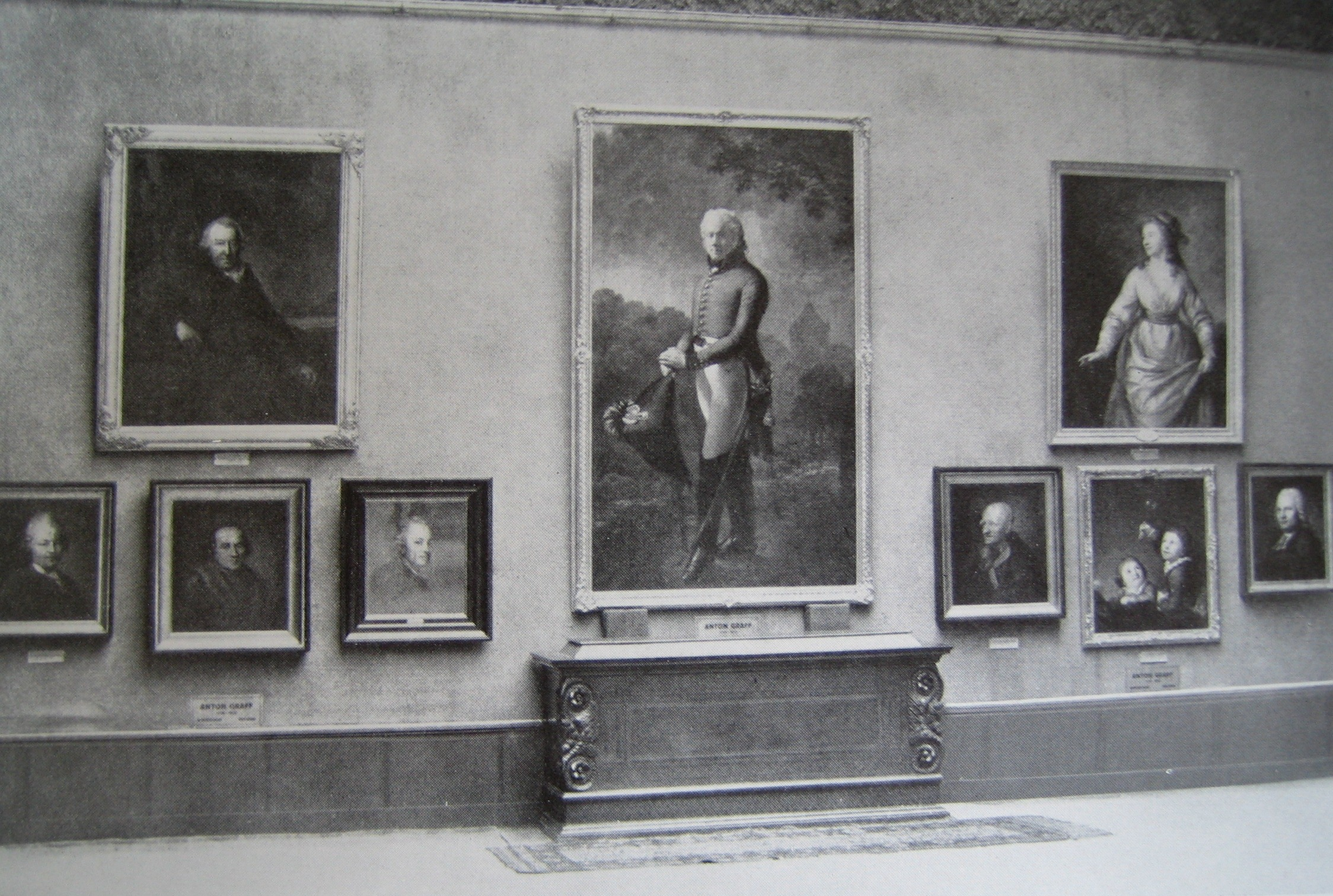 Anton Graff-Ausstellung in der Galerie Eduard Schulte, Berlin 1910. In der Mitte das 1805 entstandene Porträt von Carl Adolf von Carlowitz hängend, Herr auf Gross-Hartmannsdorf und Liebstadt. Rechts im Hintergrund ist Schloss Kuckuckstein zu sehen. Der untere Teil des Gemäldes entspricht nicht mehr dem Original. Bei Johann Georg Meusel heisst es: "stützt sich mit beiden Händen auf den Degenkorb". Der jetzt sichtbare von einem späteren Restaurator gemalte Degen sitzt also falsch.